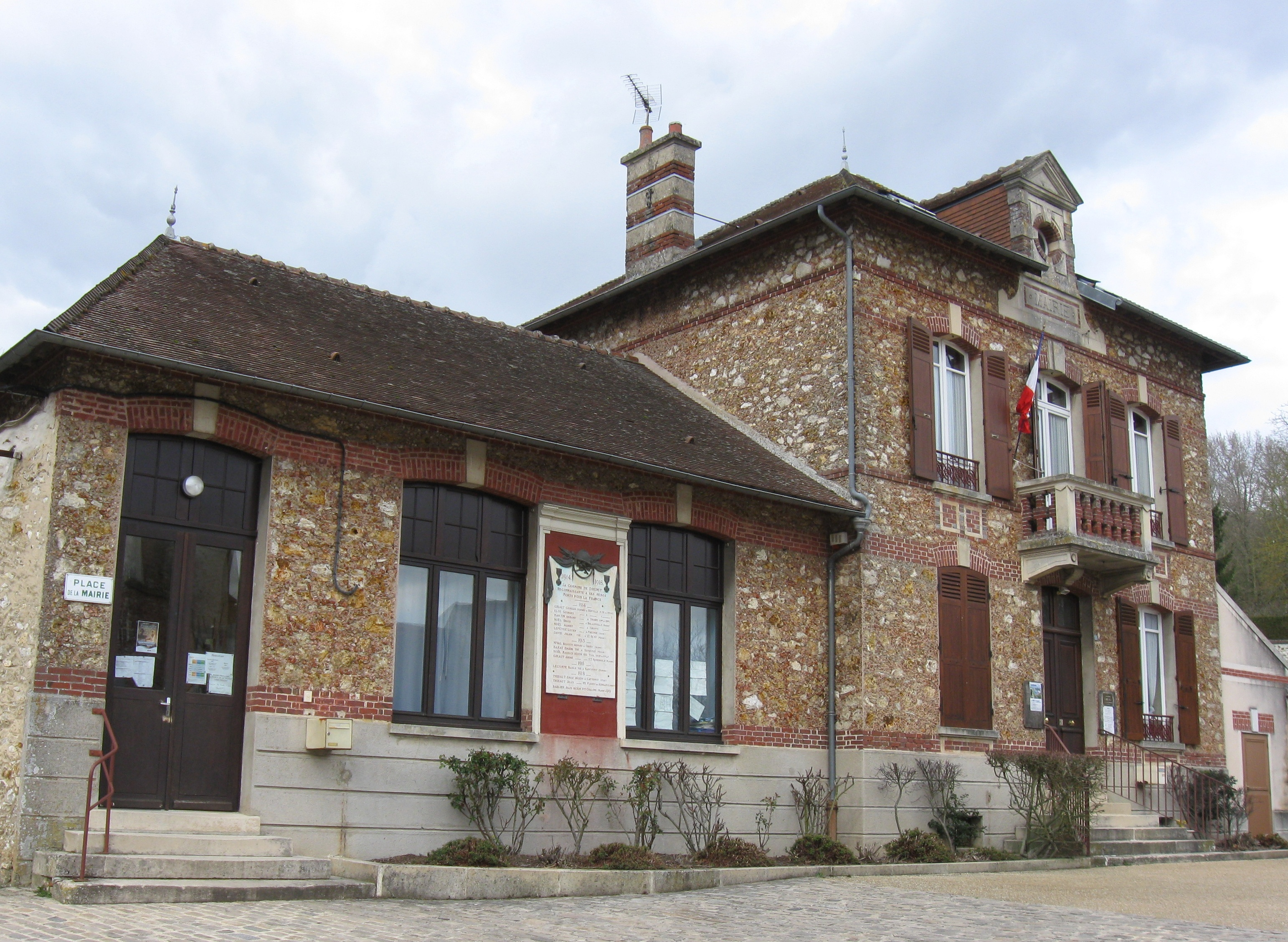 Mairie de Dhuisy. (Seine-et-Marne, région Île-de-France).